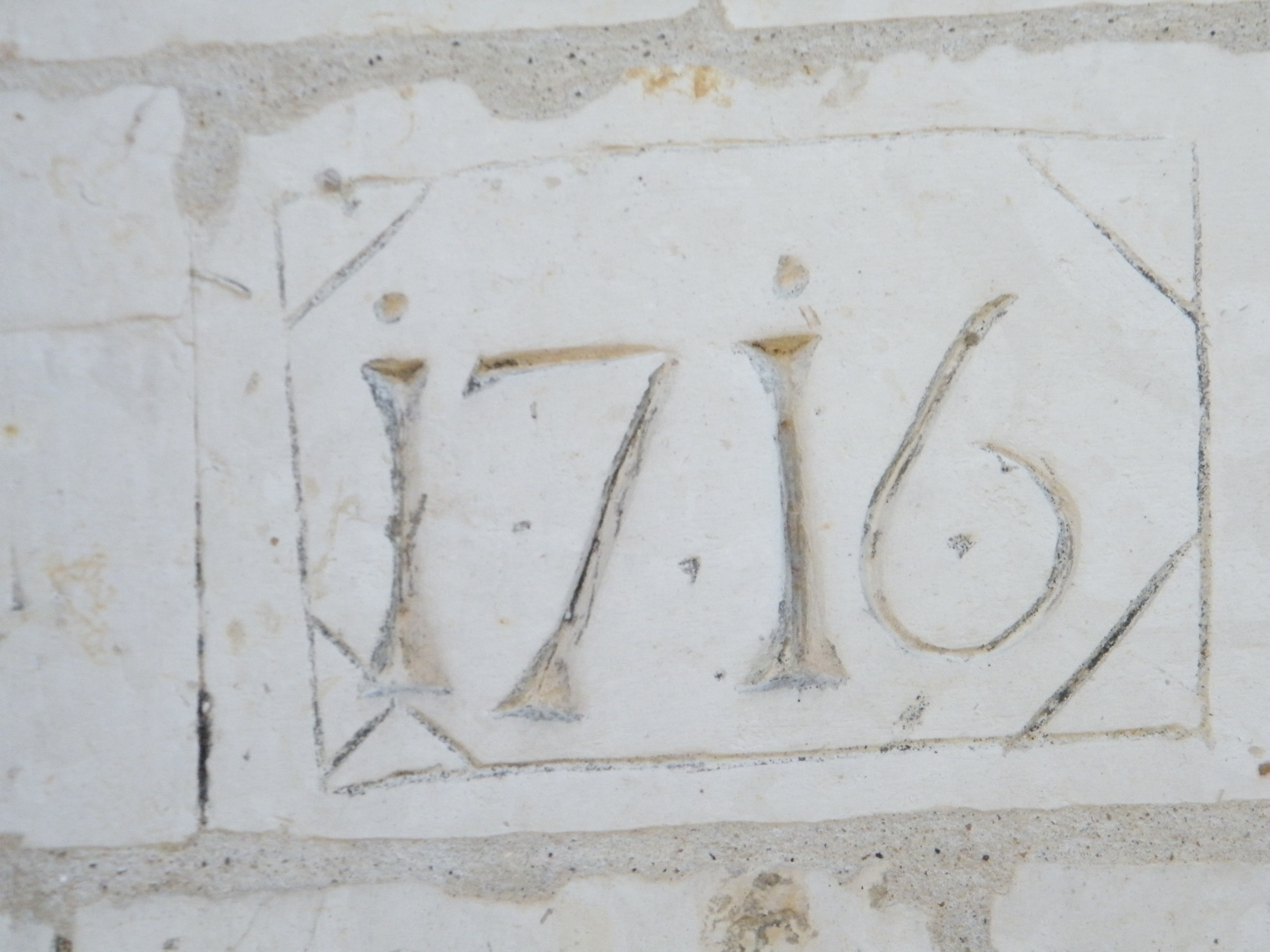 Cocquerel (Somme, France), Longuet, chapelle, graffiti extérieur.